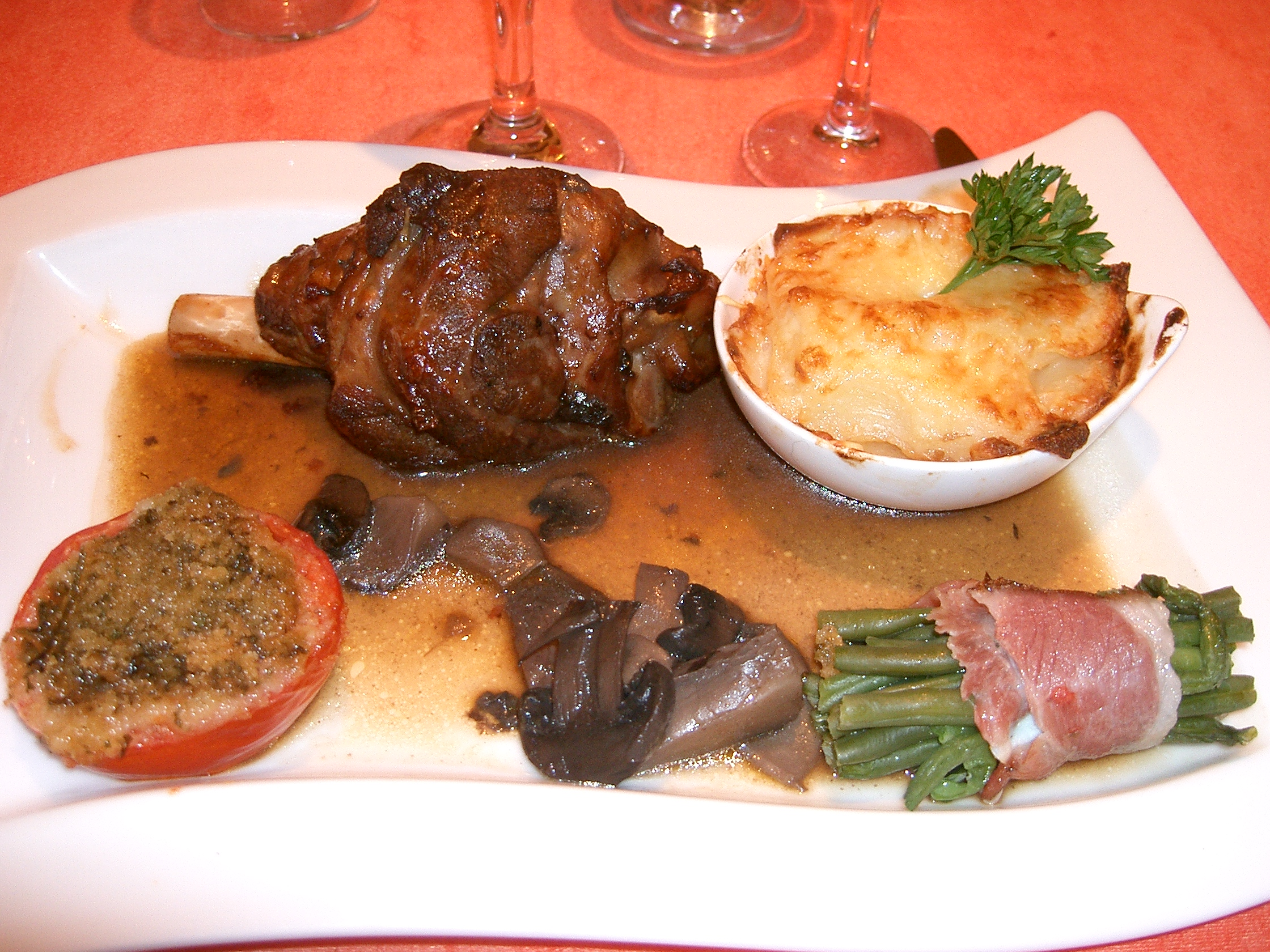 La souris d'agneau est un morceau de viande constitué par le muscle qui entoure le tibia de la patte arrière de l'agneau. En : Lamb shank